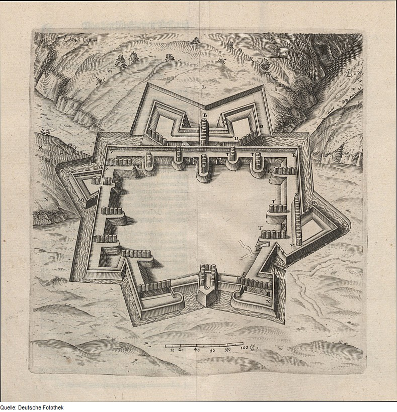 Original image description from the Deutsche Fotothek Architektur & Festung & Grundriss & Kommandement & Bastei & Kurtine